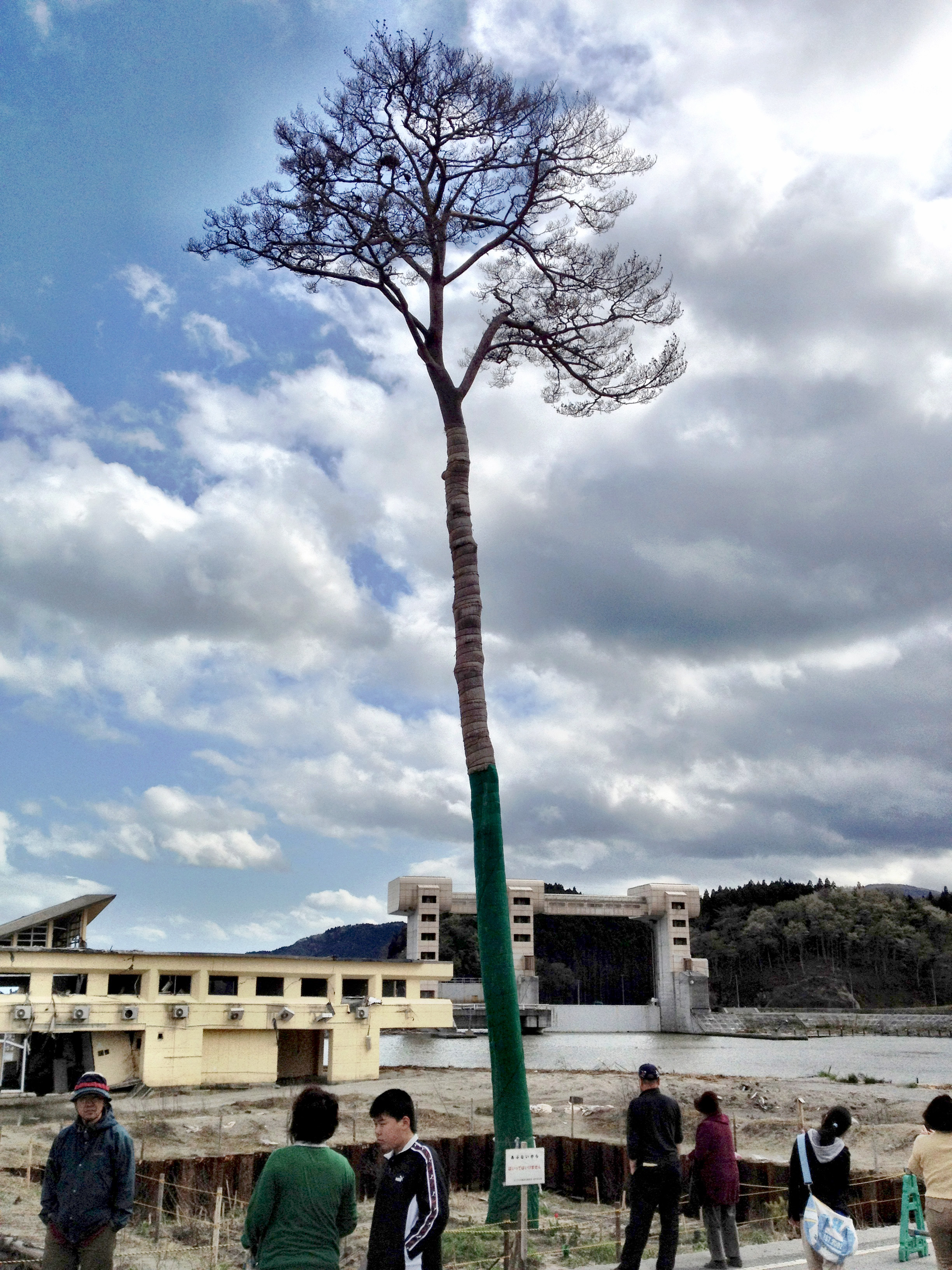 Miracle Pine Tree in Takata Matsubara